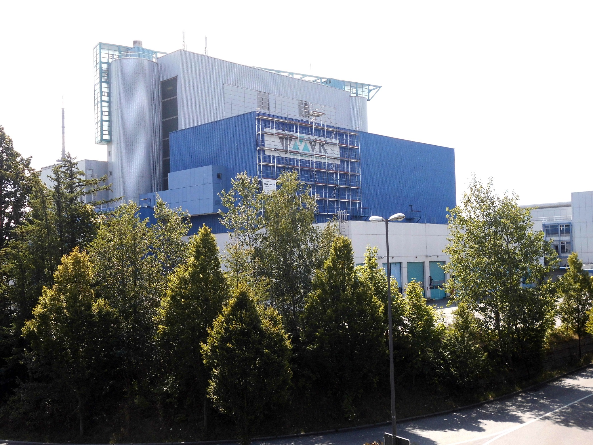 Hauptgebäude des Müllheizkraftwerkes im Kieler Stadtteil Südfriedhof